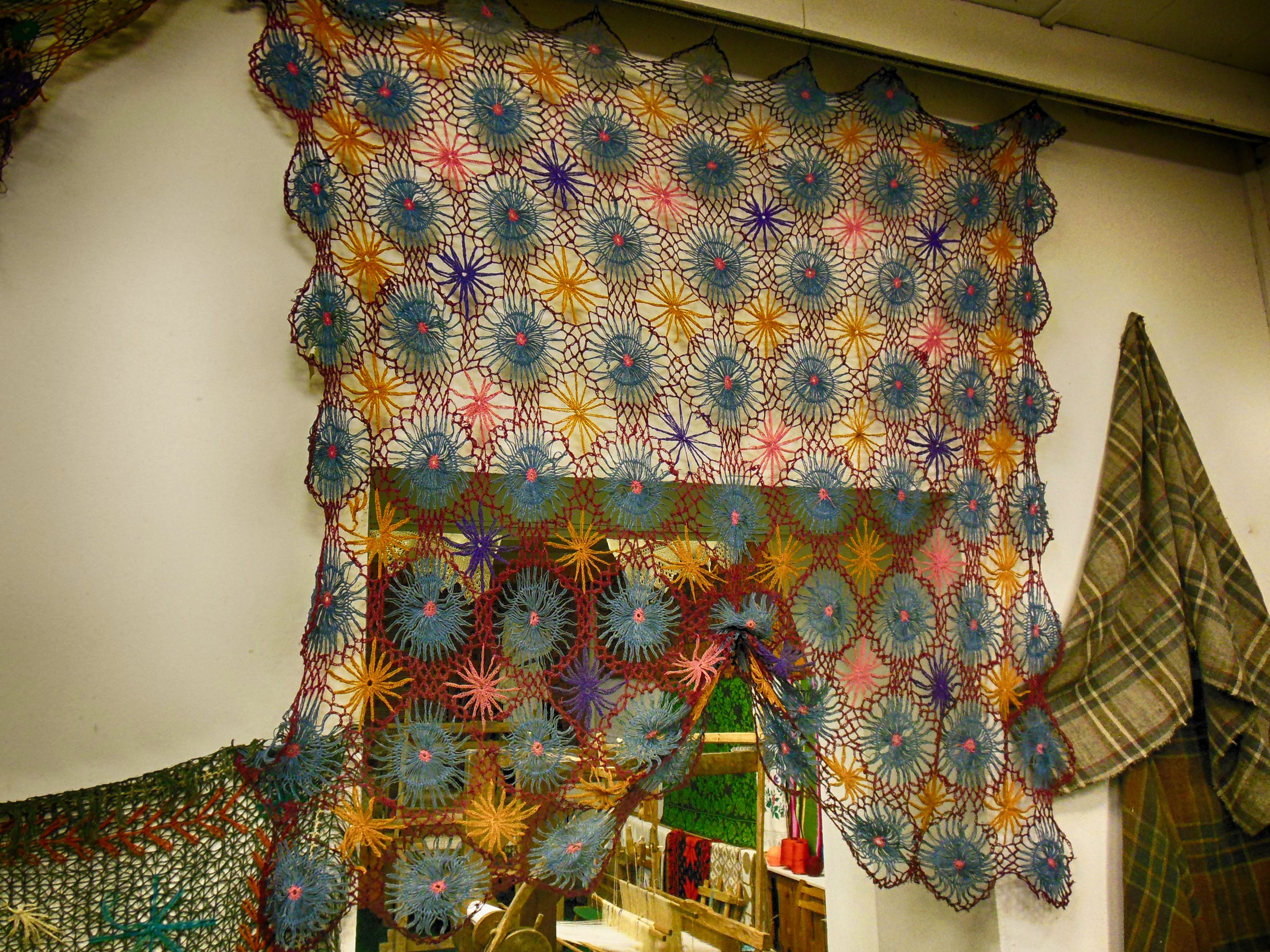 Беларуская (тарашкевіца): Гудзевіцкі літаратурна-краязнаўчы музэй